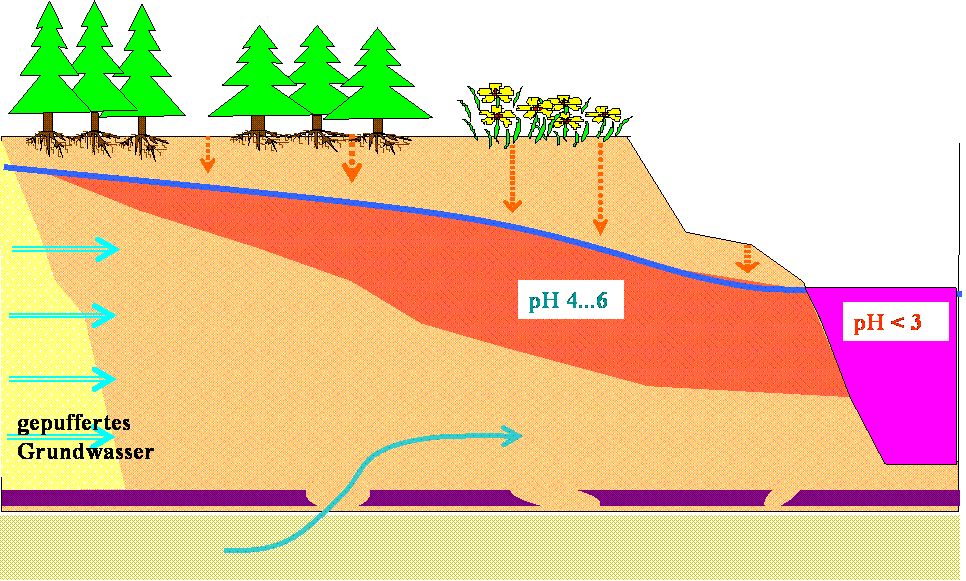 Grundwasseranstrom an einen Tagebausee durch die Kippe